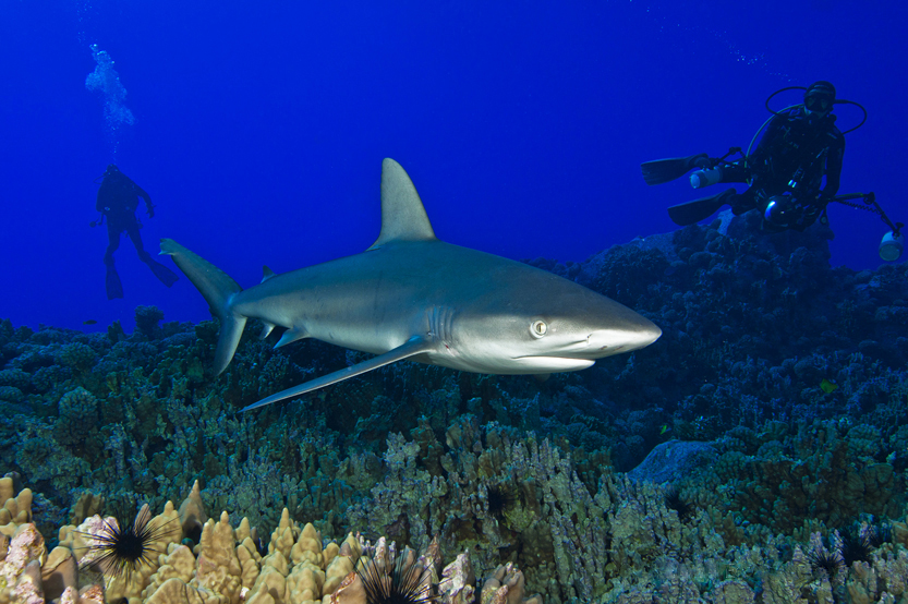 Fotos obtenidas durante la expedición que Oceana, National Geographic y la Armada de Chile realizaron en febrero al Parque Marino Motu Motiro Hiva.